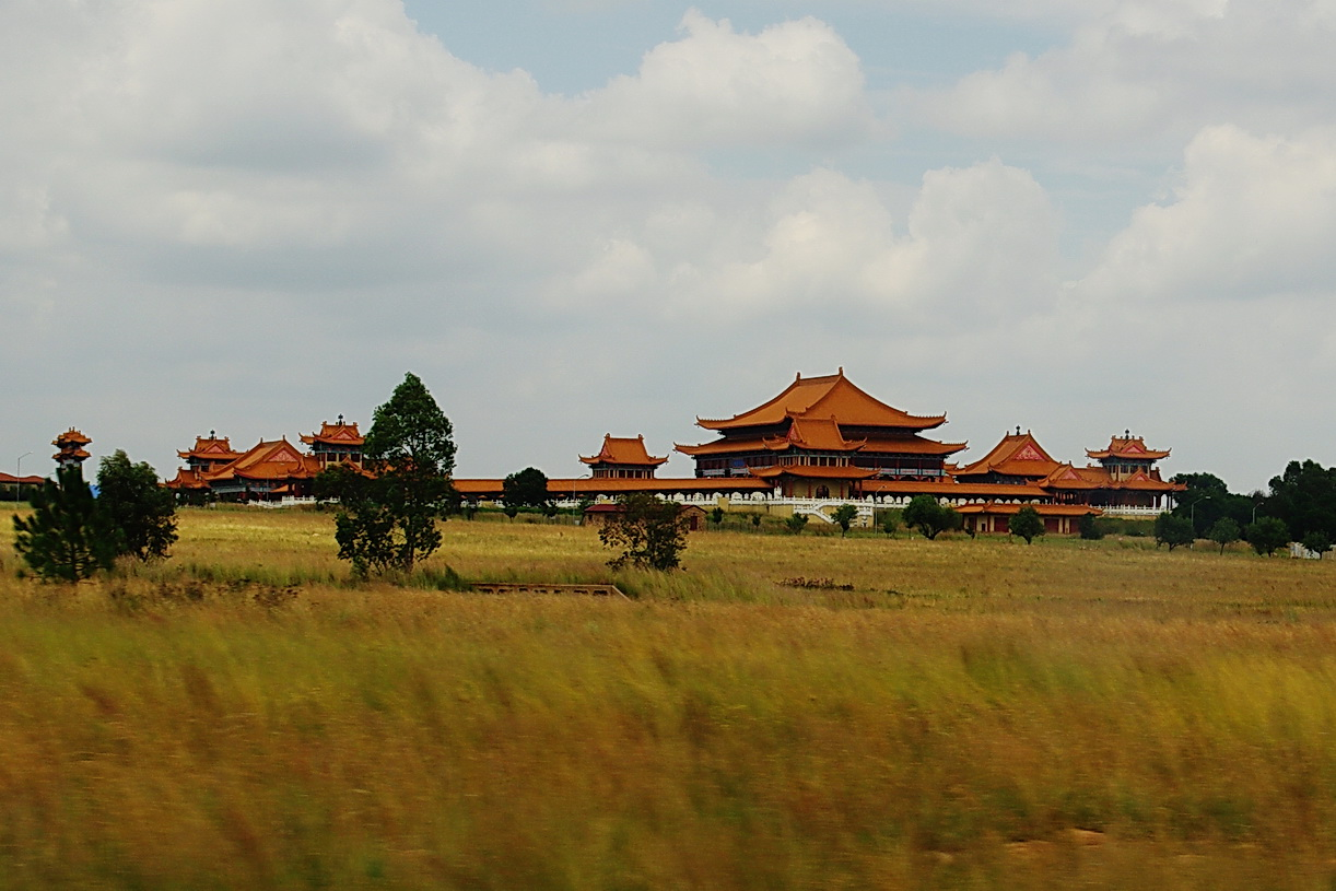 Buddh. Tempel Nanhua bei Bronkhorstspruit